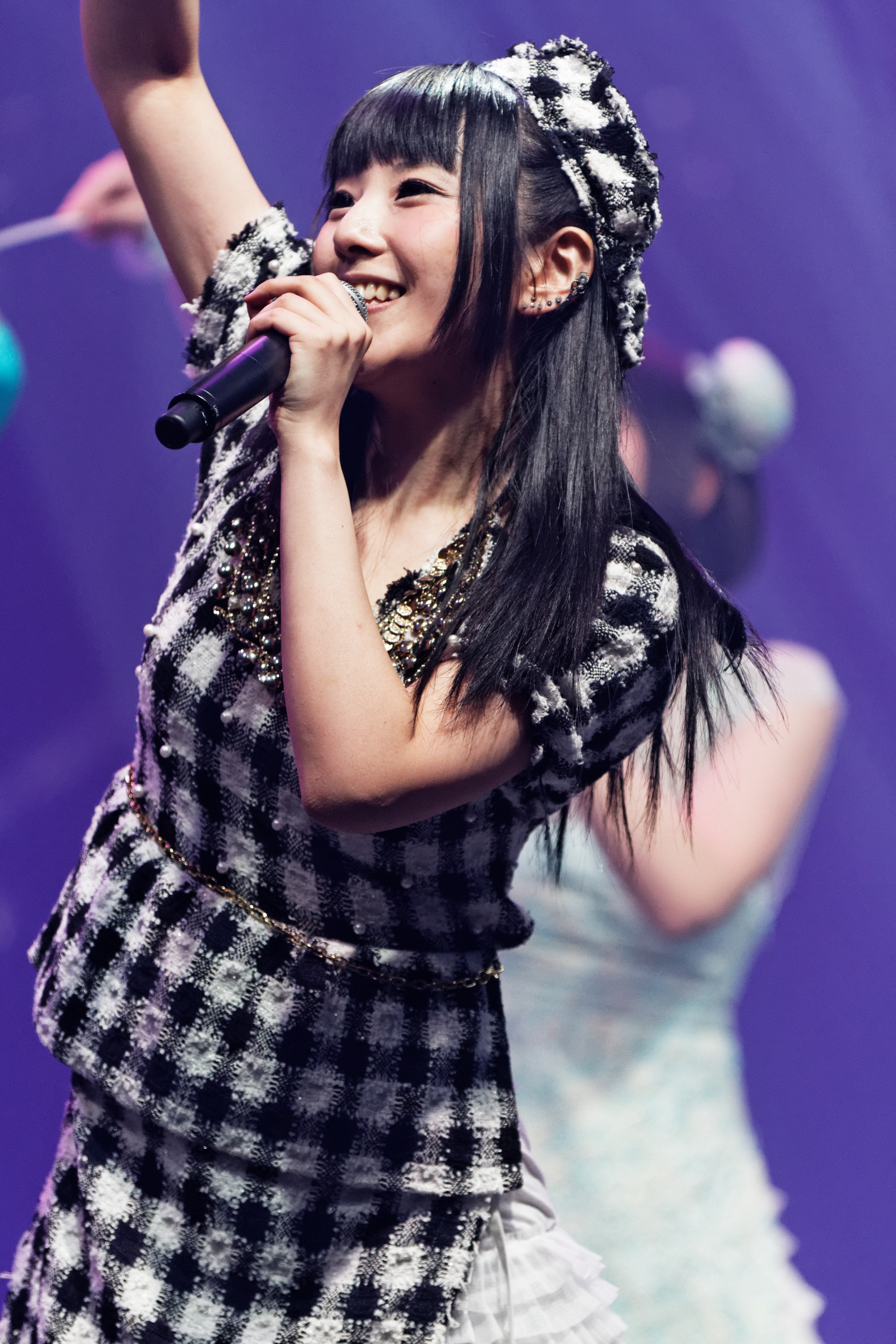 Dempagumi.inc en concert lors du live house du Japan expo Paris 2013.